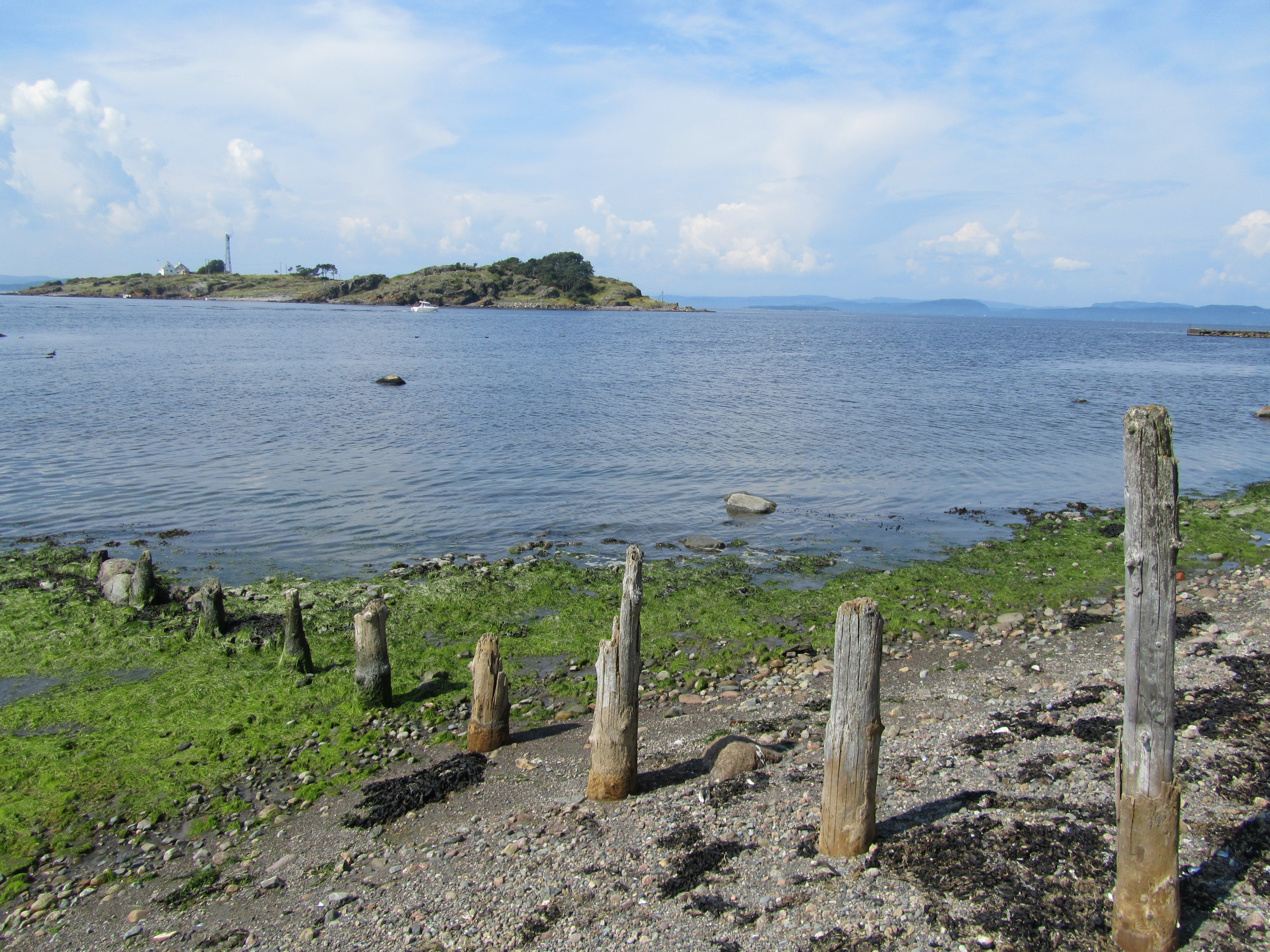 Bildet viser restene av teglverket som for 100 år siden lå nede ved Gullholmsundet på Jeløya